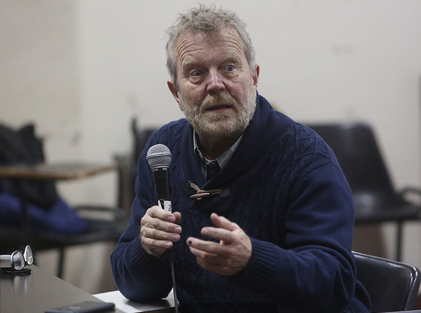 Tomás Várnagy, profesor de la Facultad de Ciencias Sociales de la Universidad de Buenos Aires, disertando en las I Jornadas Internacionales de Estudios Sociales del Humor y lo Cómico, julio de 2019.